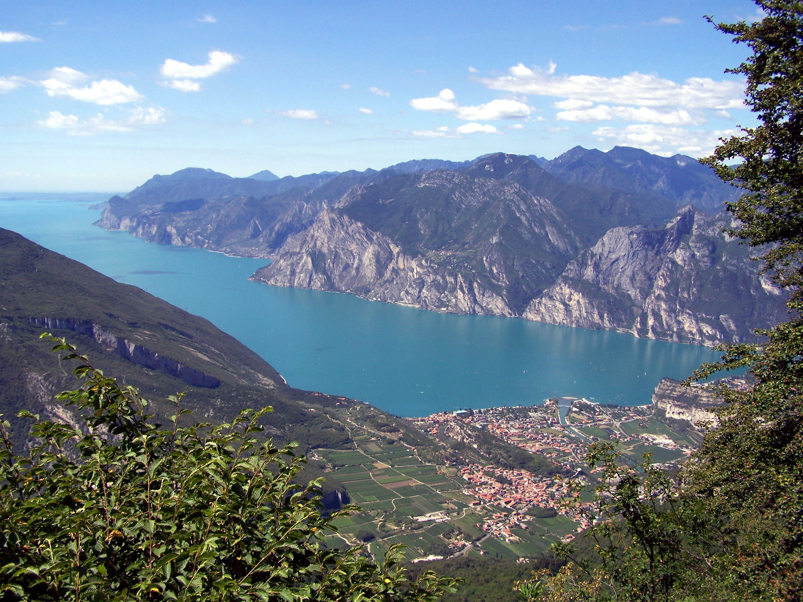 Beschreibung: Blick vom Monte Creino auf Nago-Torbole und den nördlichen Gardasee / View form Monte Creino to Nago-Torbole and the nothern part of Lake Garda Quelle: selbst fotografiert / selfmade picture Datum: 25.07.2007 Urheber: User:Ampfinger